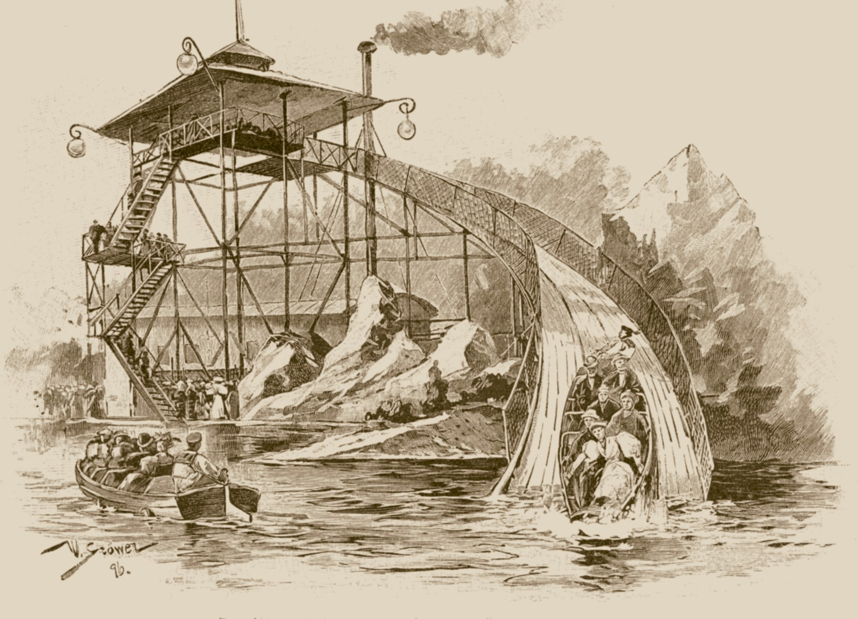 Wasserbahn, ca. 1896